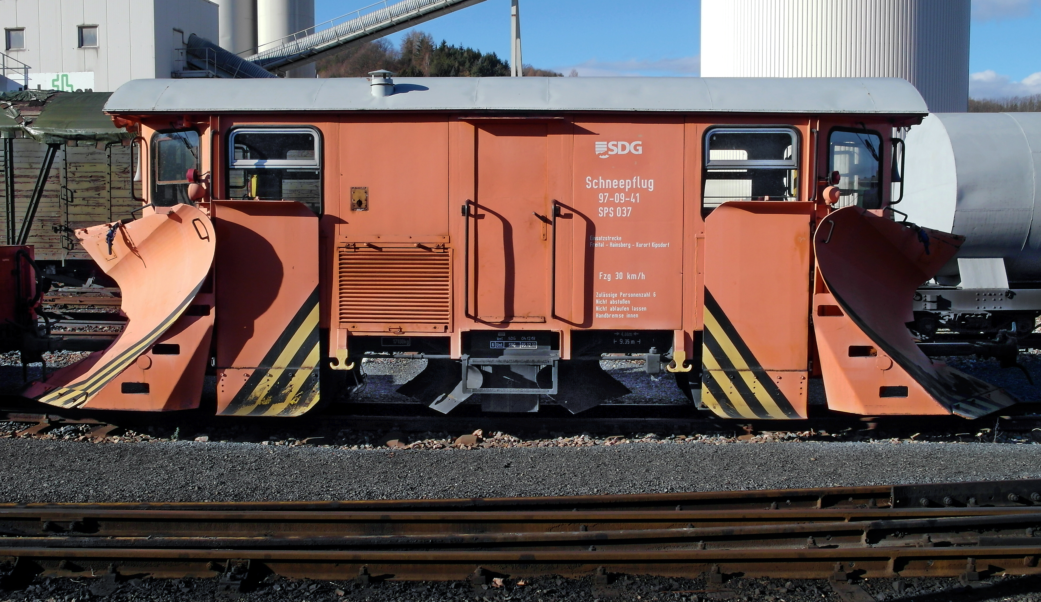 02.02.2018 01705 Freital-Hainsberg, Dresdner Straße 280a (GMP: 50.988399,13.638035): Bahnhof für die regelspurige Sachsenmagistrale Dresden - Werdau und die Schmalspurbahn Freital-Hainsberg nach Kippsdorf im Erzgebirge. 750mm Schmalsspurbahn-Schneepflug SDG DR 97-09-41; SPS 037. Hersteller RAW Meinigen 1988. [SAM3750.JPG]20180202325DR.JPG(c)Blobelt